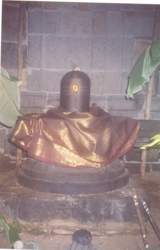 திருஇரும்பை மாகாளத்துத் தொன்மையான லிங்கம்.